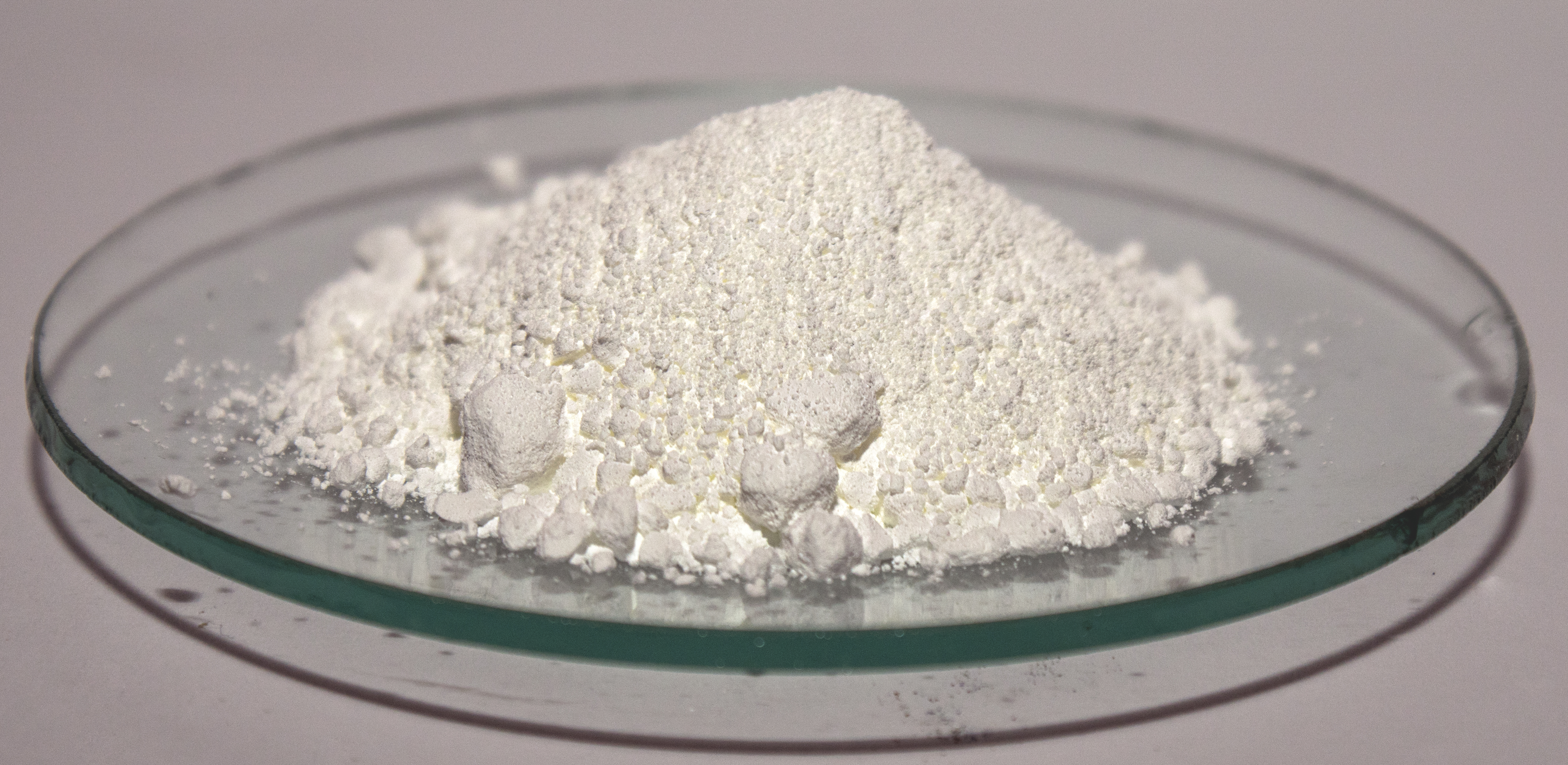 Tlenek cynku.